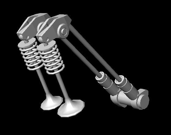 Pushrod valvetrain